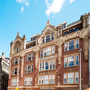 Scheltema op het Rokin 9.